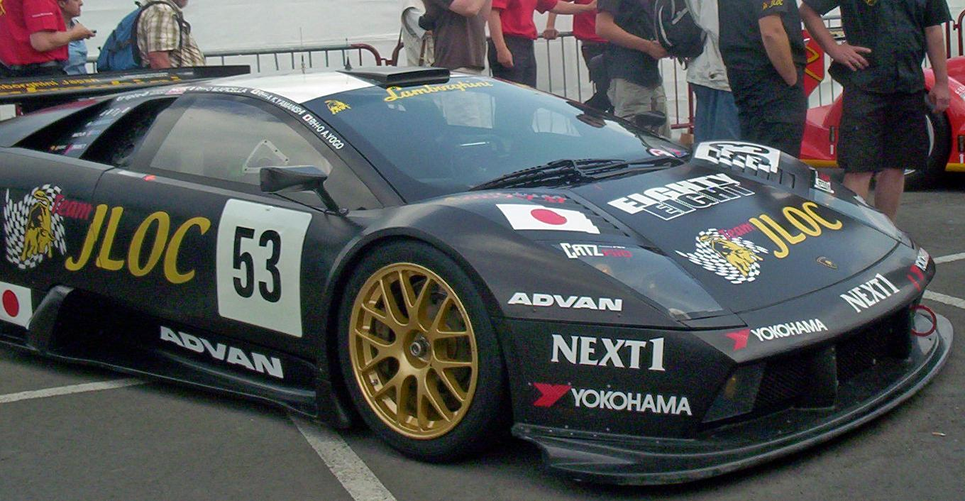 Une Lamborghini de compétition japonaise présentée lors du pesage pour les 24h du Mans 2007.